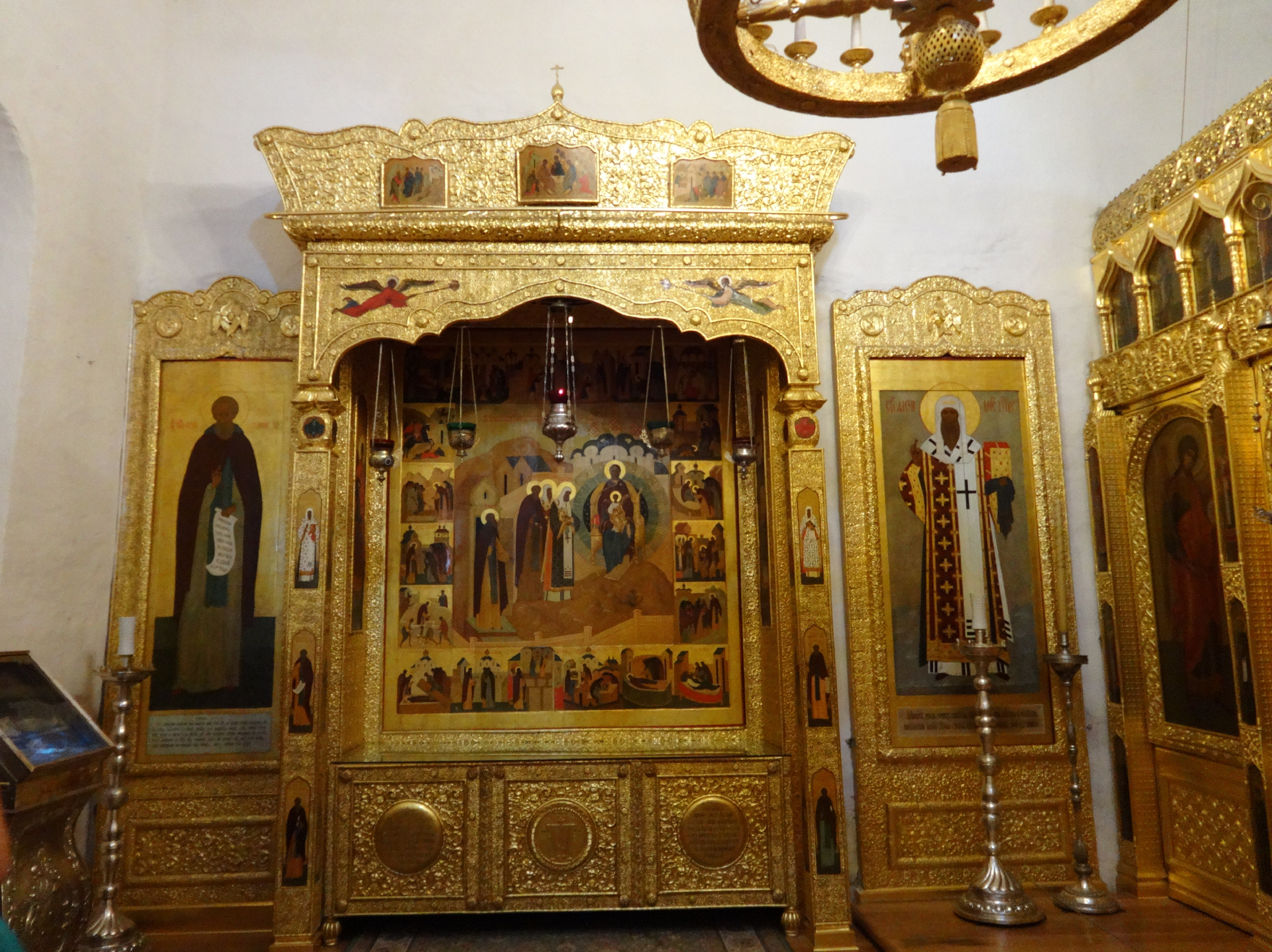 Церковь Никоновского придела (часть Троицкого собора, N 5010420024) (Москва и Московская область, Сергиев Посад, у южной стены Троицкого собора)